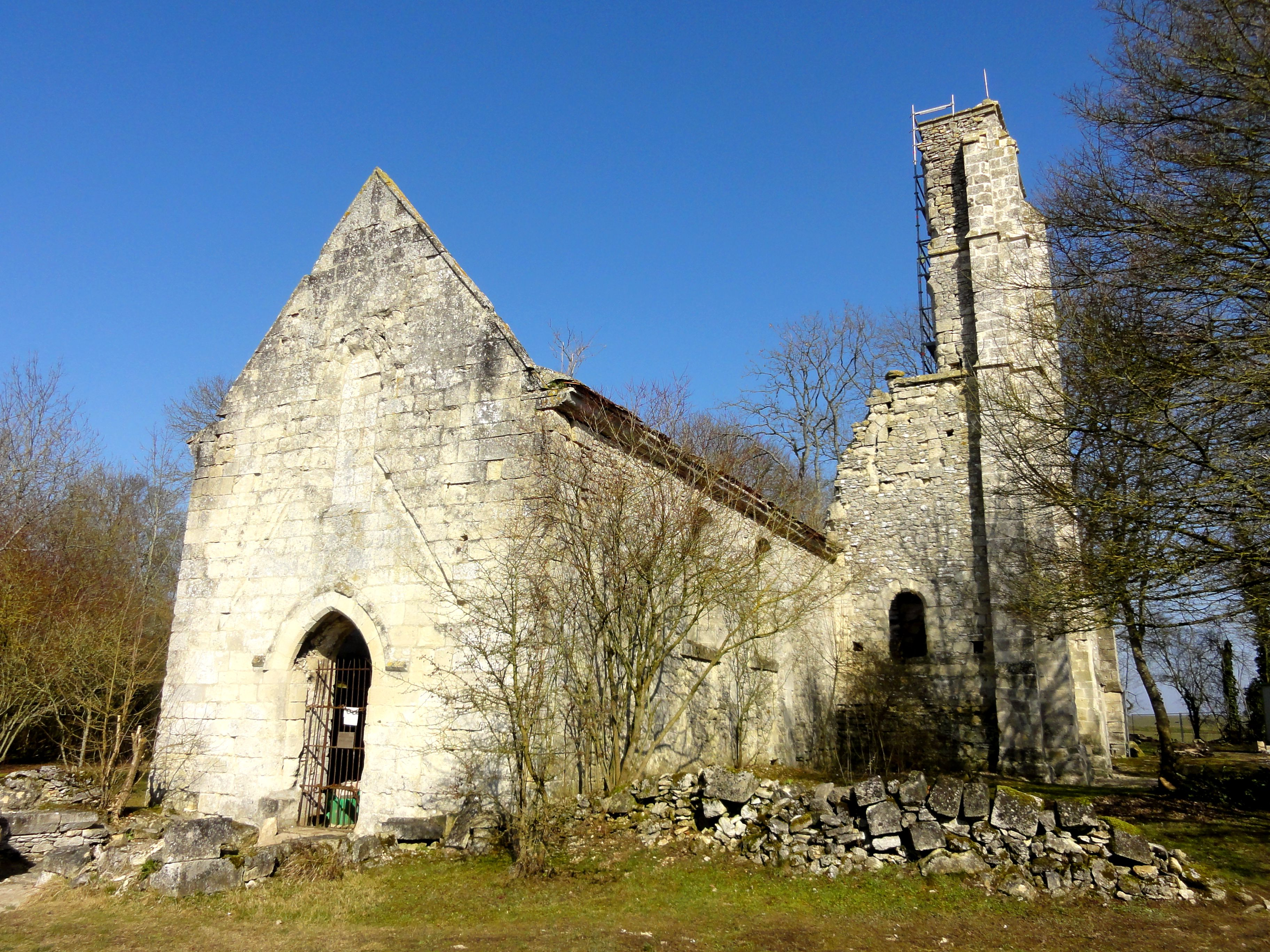 Vue d'ensemble depuis le sud-ouest.